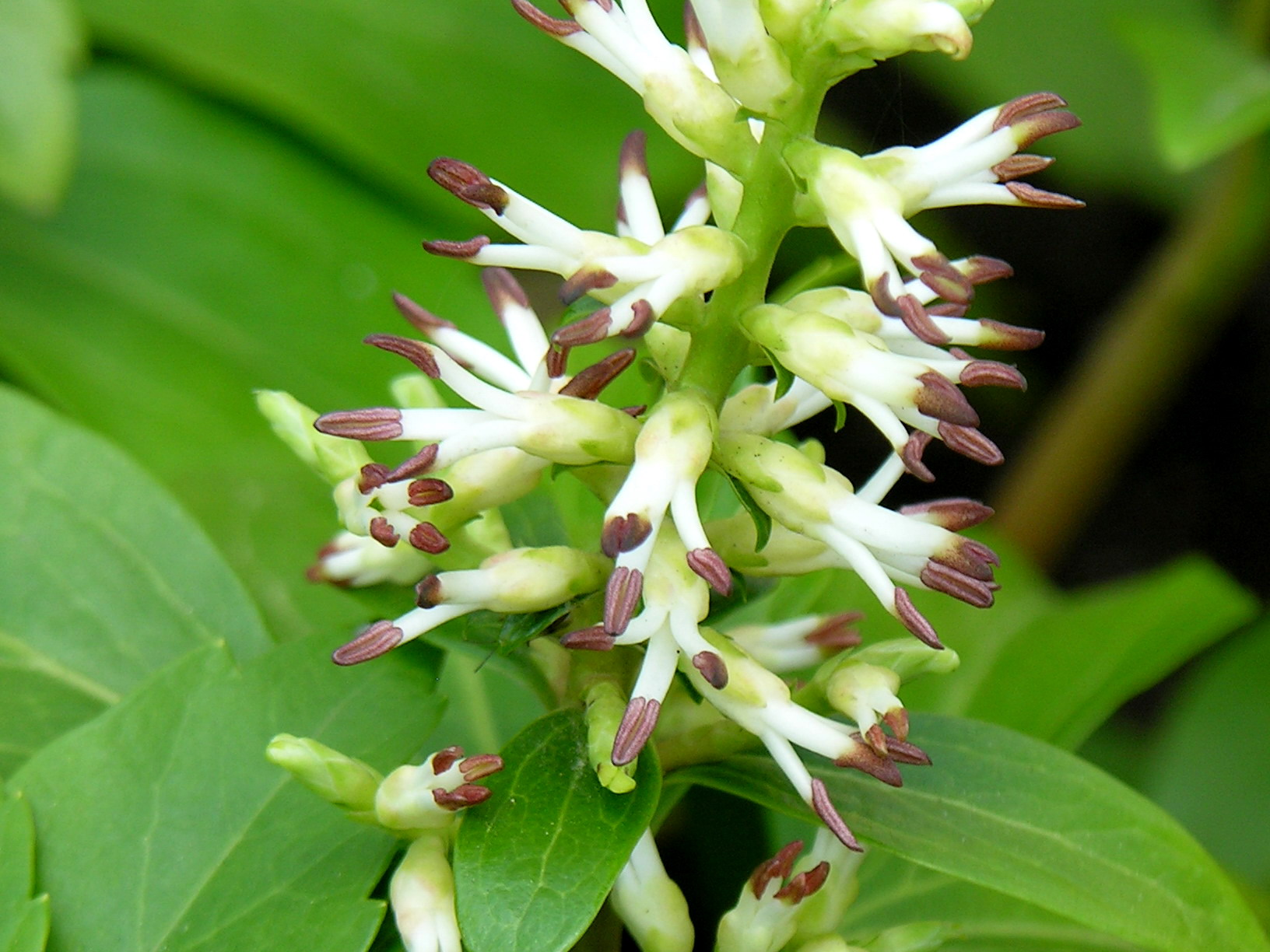 Viršūnžiedė pachisandra (Pachysandra terminalis) Šeima. Buksmediniai (Buxaceae) Fotografavo: Algirdas, 2006 m. gegužės 3 d.